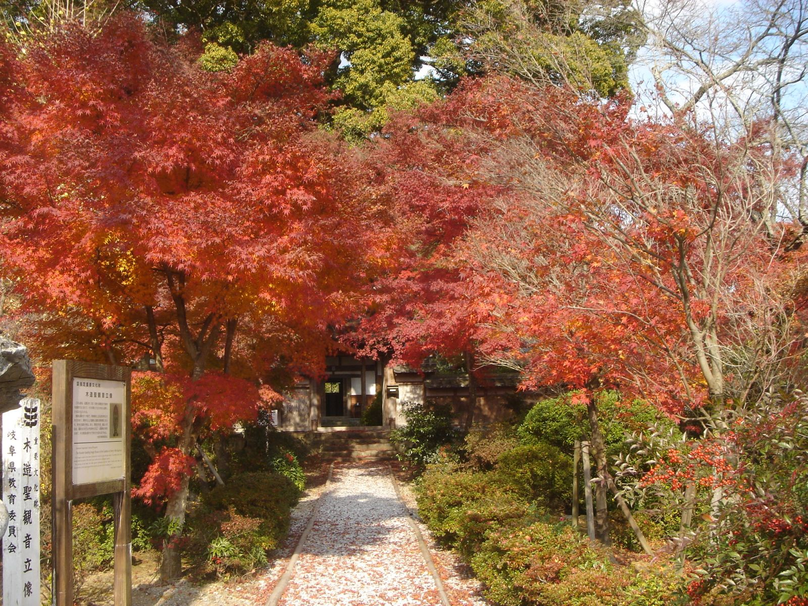 Enko-ji(Temple)(円興寺),Ogaki,Gifu,Japan(岐阜県大垣市)で撮影。